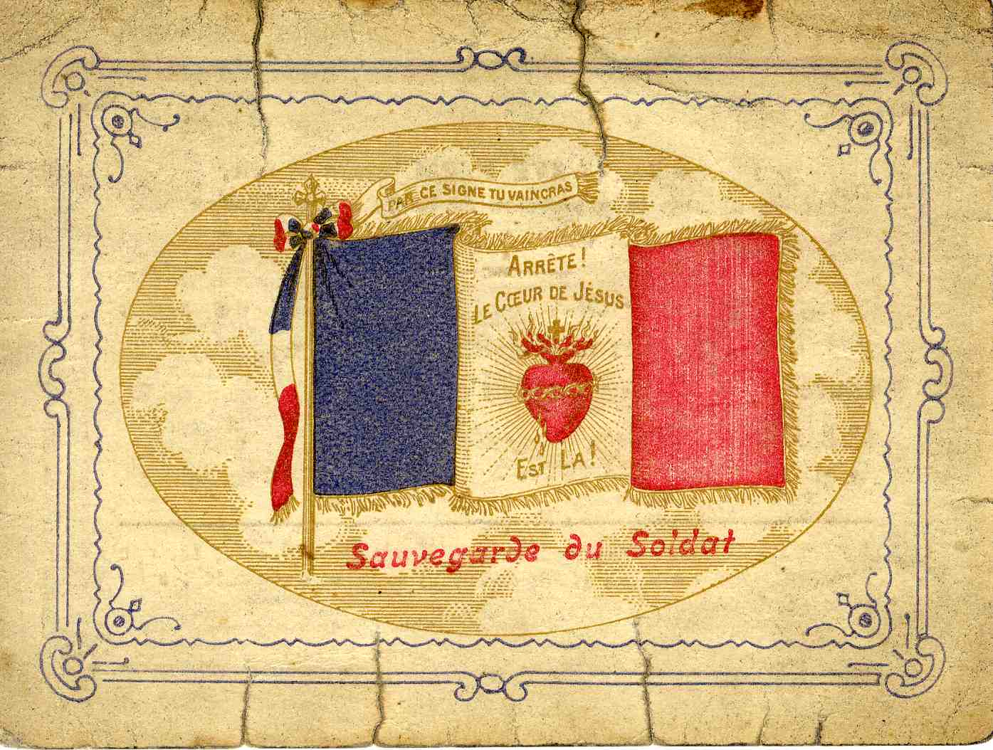 Cultivateur à Prix-lès-Mézières (Ardennes), Paul Briffoteaux s'est engagé au 3e régiment de cuirassiers en janvier 1901. Une carrière militaire exemplaire pour ce brigadier promu sous-officier en 1918. Cité à l'ordre du régiment et obtenu la croix de guerre "pour avoir assurer, le 6 avril 1918, une liaison en traversant une zone violemment battue par les mitrailleuses ennemies". Une distinction renouvelée lors de la Seconde guerre mondiale au cours de laquelle Paul Briffoteaux s'est particulièrement distingué en tant que membre du secteur des Forces françaises de l'intérieur de Vouziers. Il est décédé le 13 décembre 1963 à Vouziers, ville natale de son épouse Jeanne Simon.